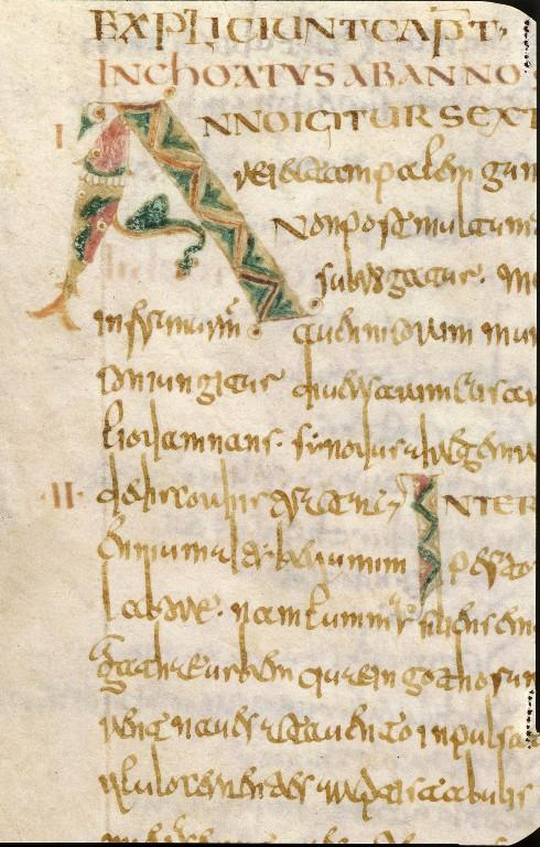 Grégoire de Tours, Historia Francorum. Fol. 79v. Initiale ornée "A". Manuscrit : parchemin. 10 volumes. Bibliothèque nationale de France, Département des Manuscrits (division occidentale). Latin 17655.